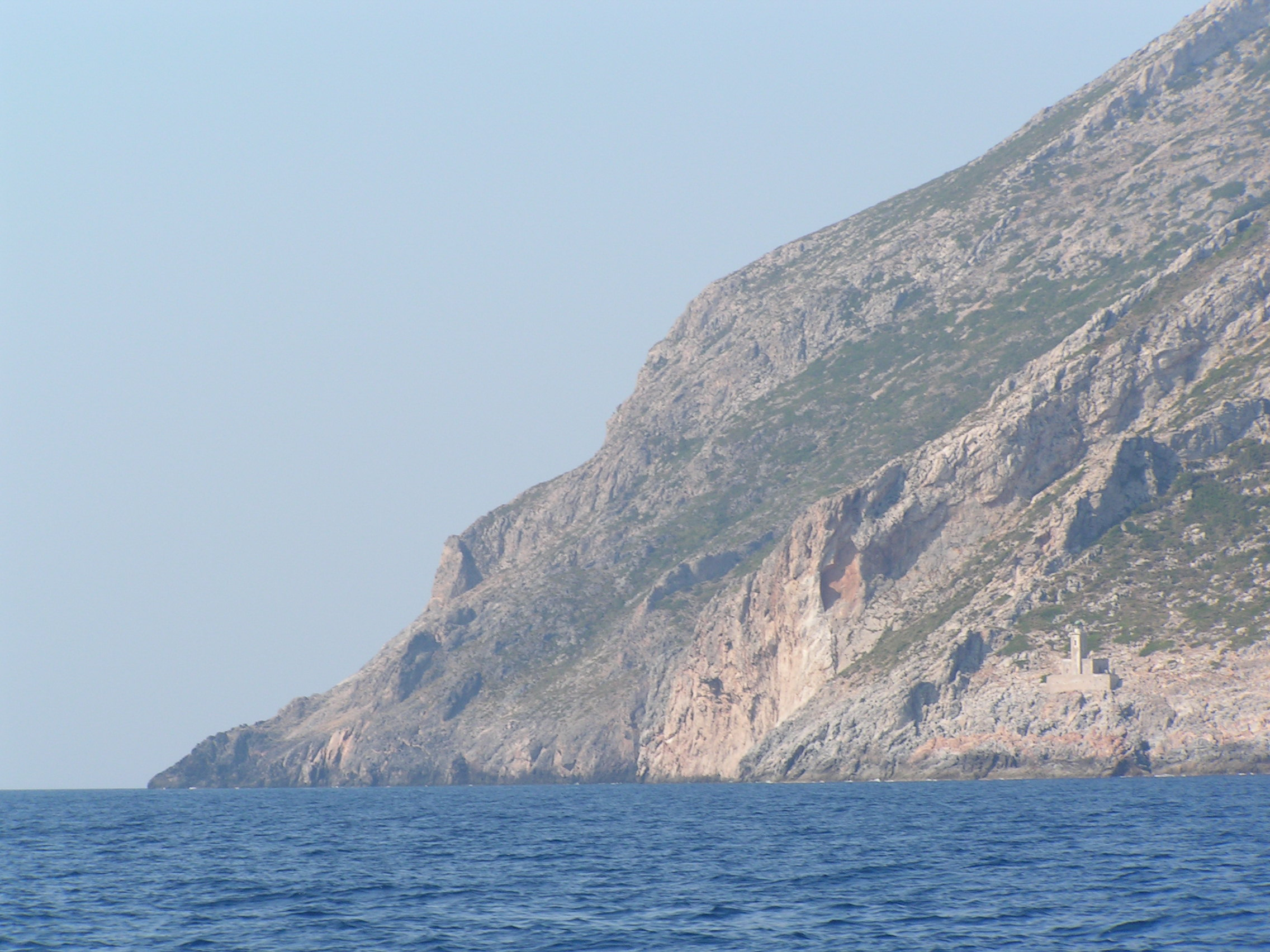 Dit is een foto die door de initiële auteur van deze bijdrage is gemaakt toen hij in 2005 met zijn zeiljacht Kaap Malea rondde.